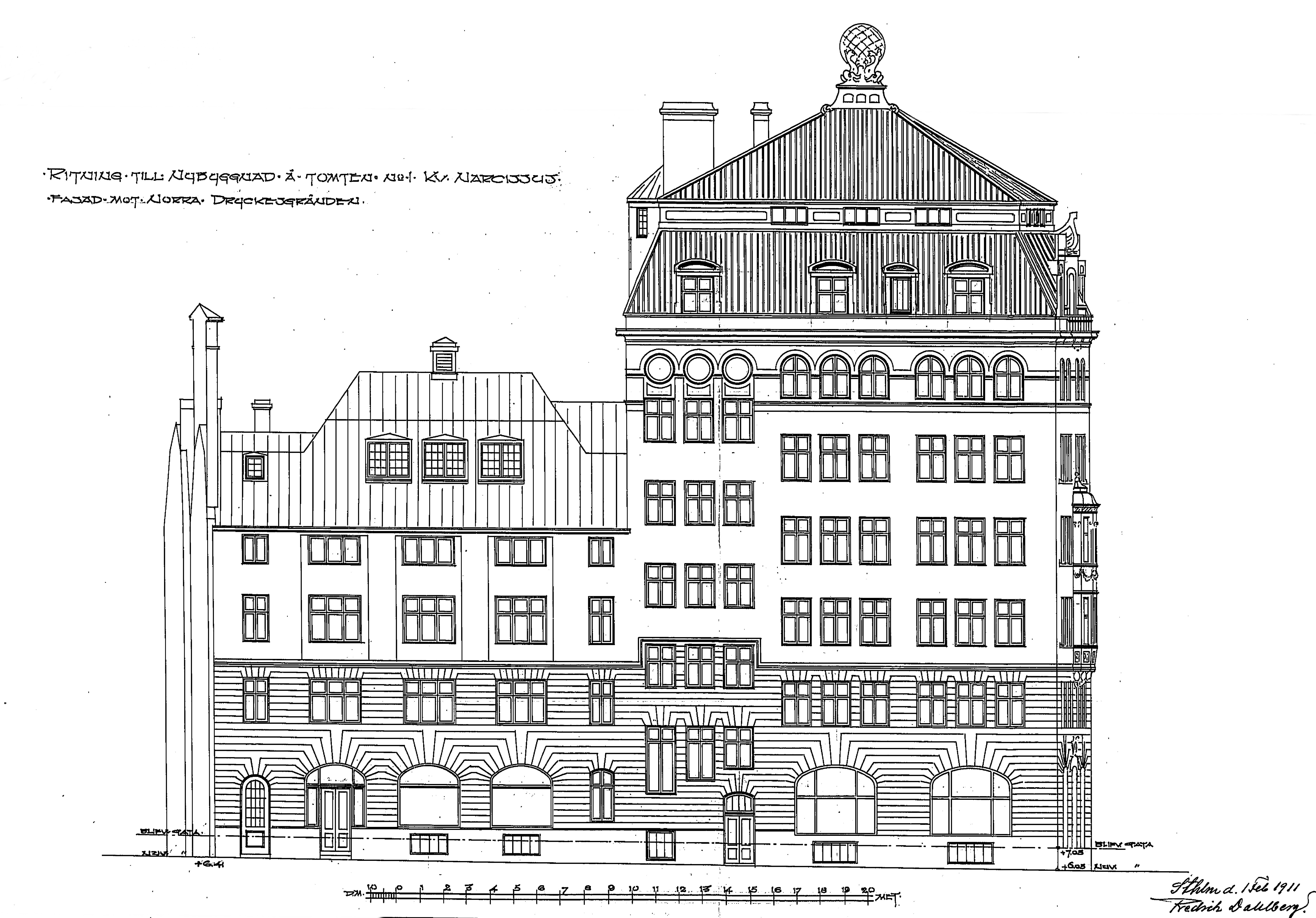 Nybyggnadsritningar för fastigheten Narcissus 1, Skeppsbron 44